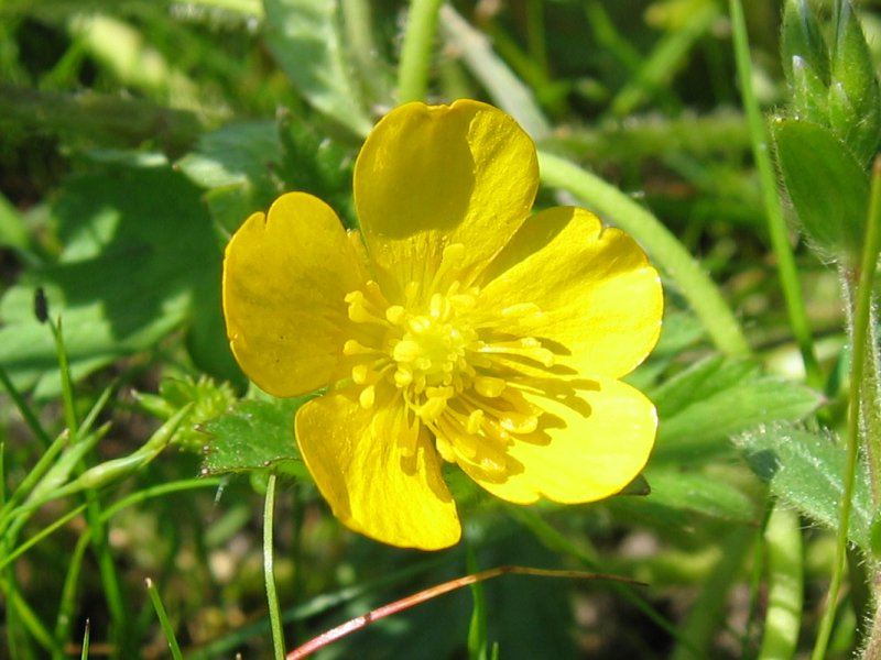 Kriechender Hahnenfuß Ranunculus repens, Östlich Zingst